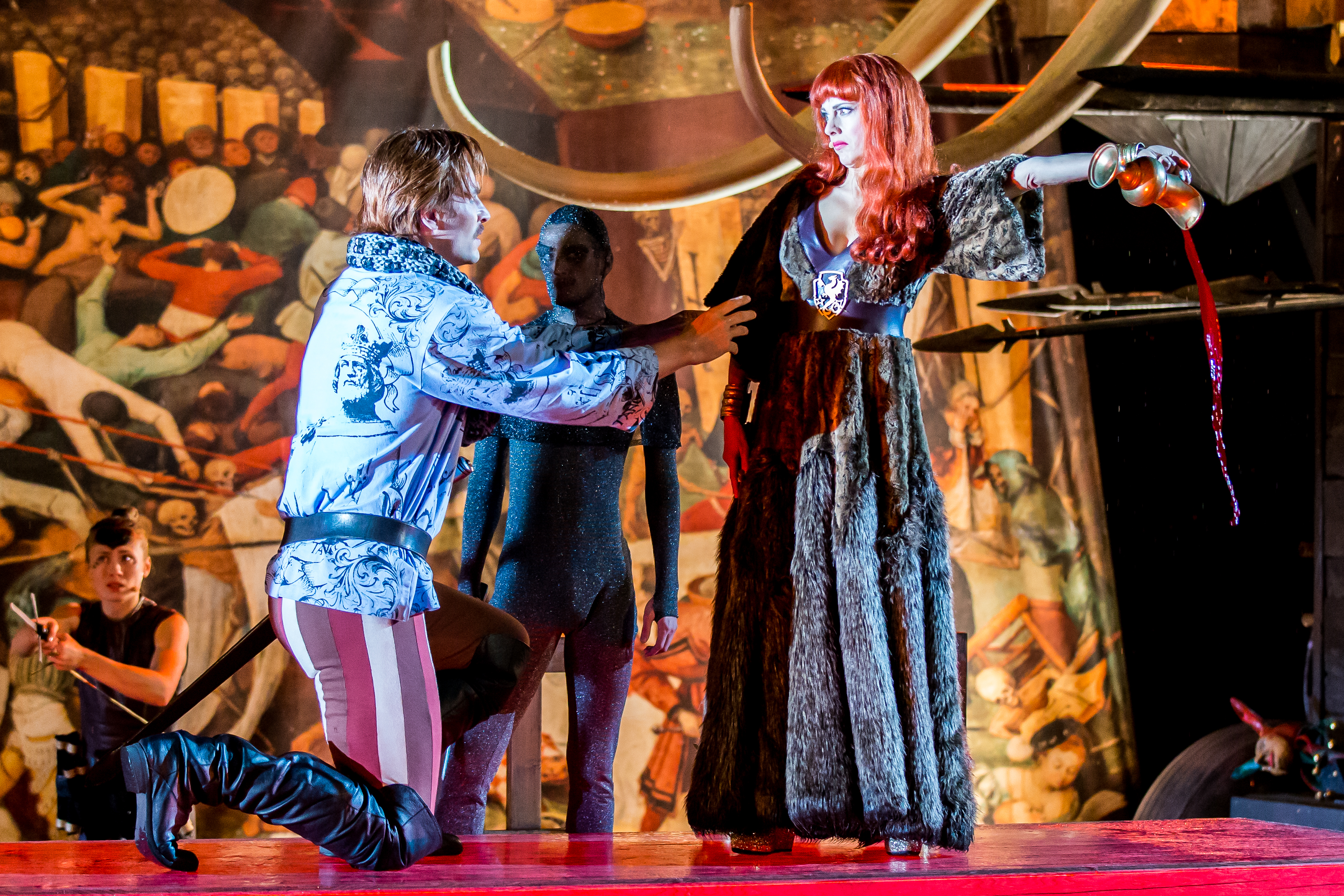 Nibelungenfestspiele Worms Gemetzel 2015 Nordseite Wormser Kaiserdom Nico Hofmann (Intendant), Albert Ostermaier (Autor), Thomas Schadt (Regisseuer) Enemble: Alina Levshin (Ortlieb), Maik Solbach (Narr), Judith Rosmair (Kriemhild), Catrin Striebeck (Brünhild), Markus Boysen (Etzel), Heiko Pinkowski (Dietrich), Max Urlacher (Hagen), Holger Kunkel (Gunter), Gabriel Raab (Gernot), Peter Becker (Giselher), Tom Radisch (Volker), Marion Breckwoldt (Zofe), Radu Cojocariu (Erzähler)